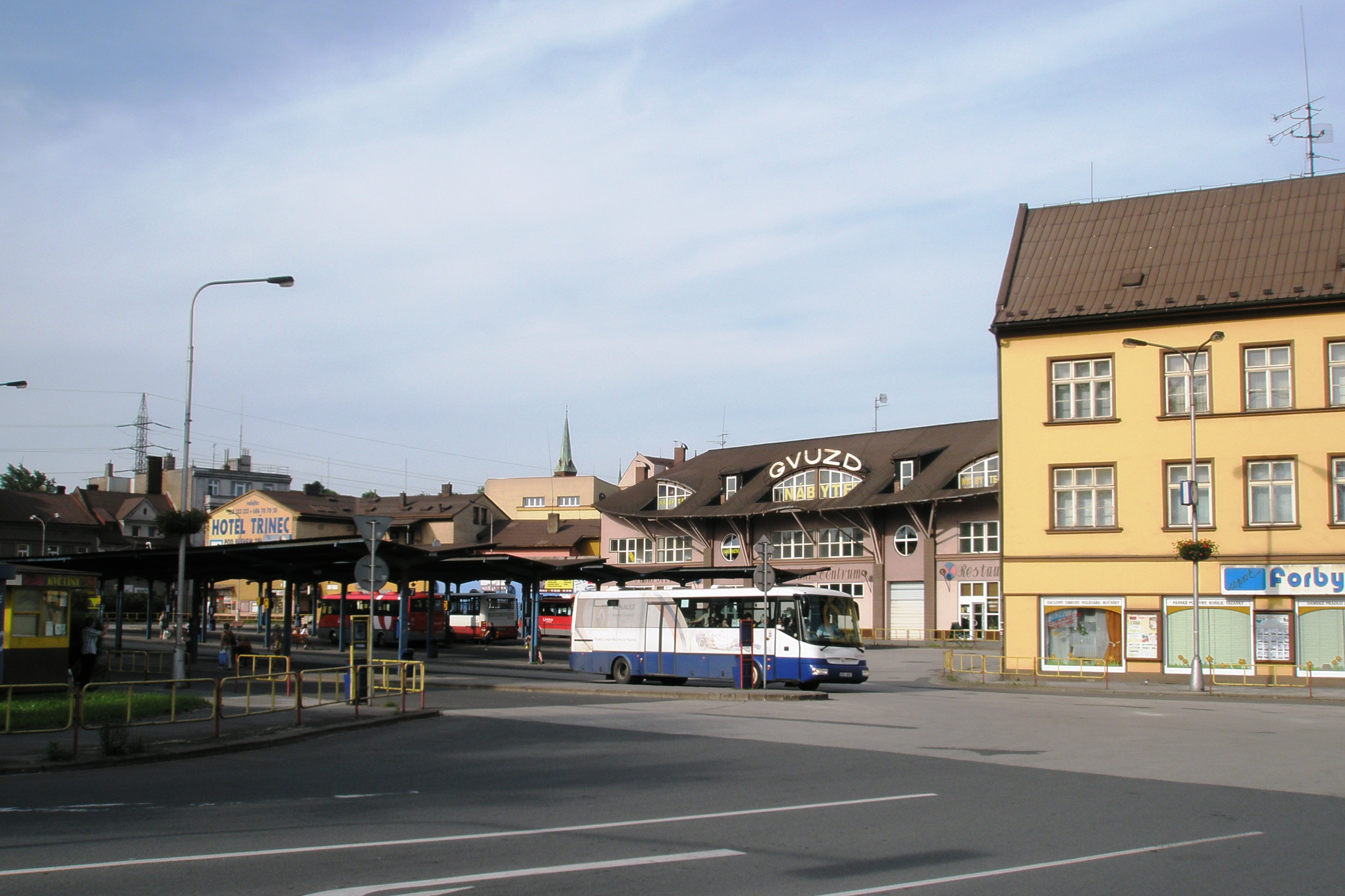 Česky: Autobusové stanoviště v Třinci - Starém Městě mezi ulicemi Frýdecká, 1. máje, Poštovní a Staroměstská.